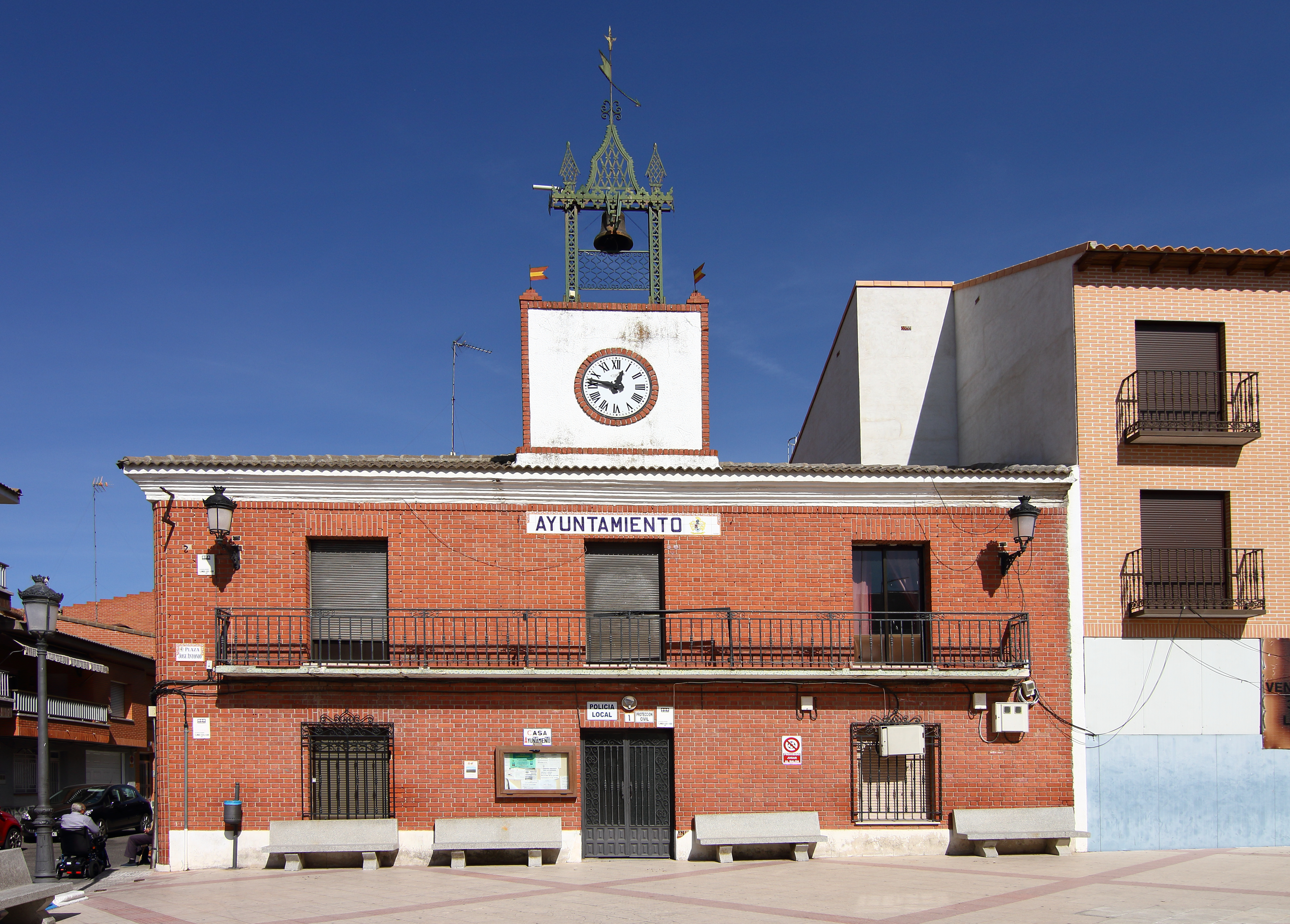 Ayuntamiento de Lominchar